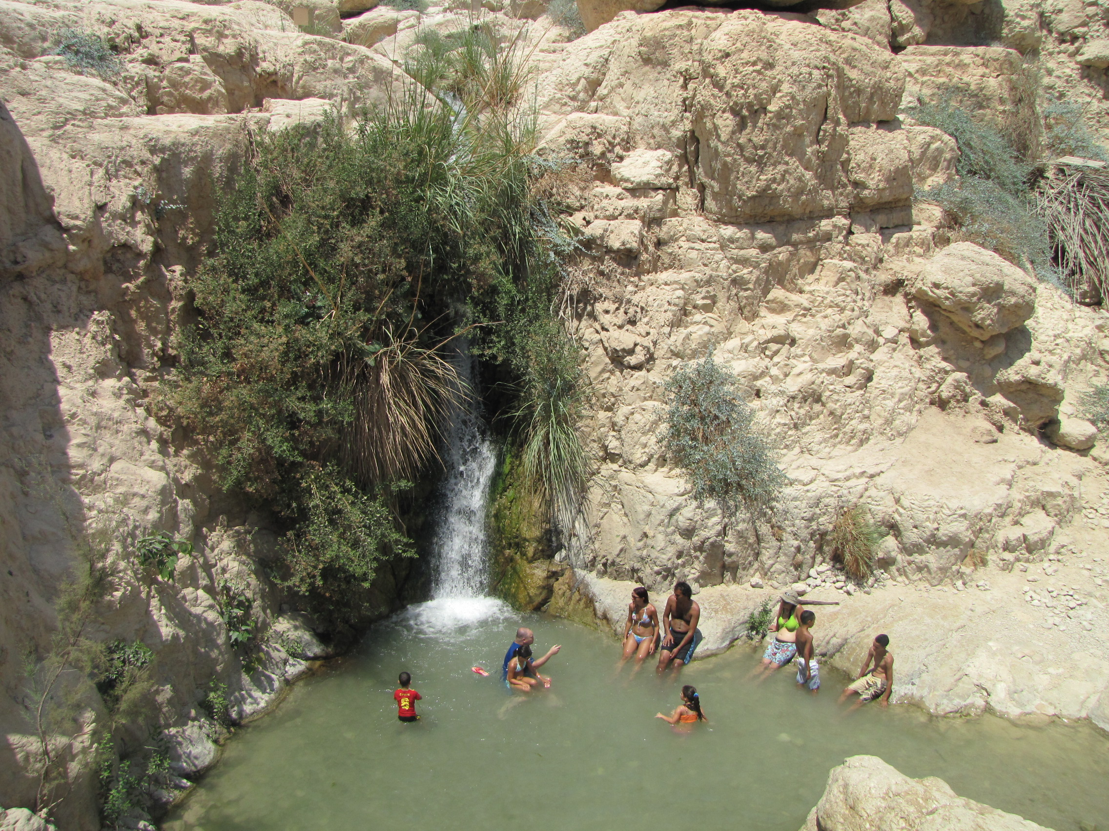 En Gedi (Ein Gedi), beim Toten Meer. Wasserpfuhl des Nachal David.